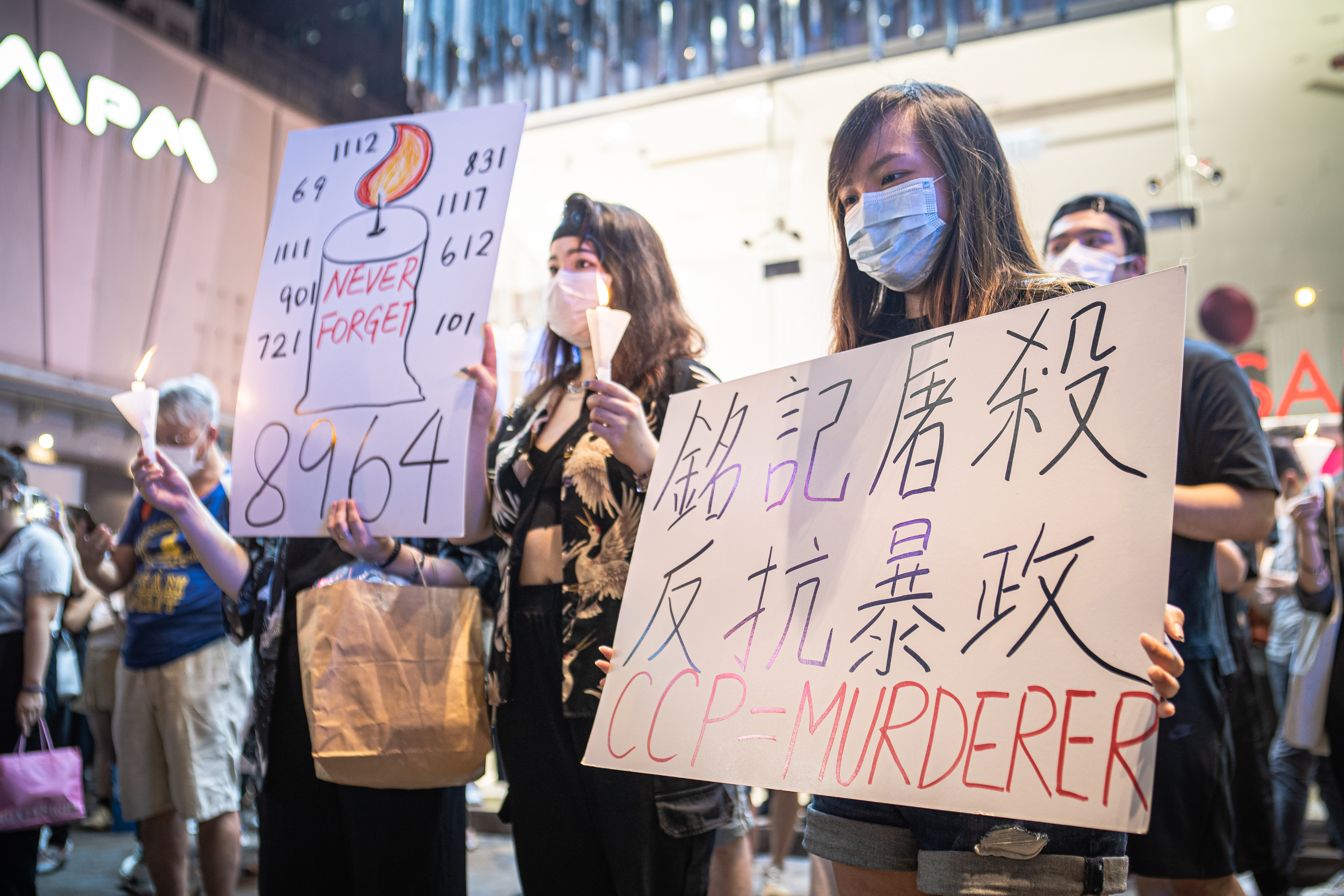 20200604-SDIM2297